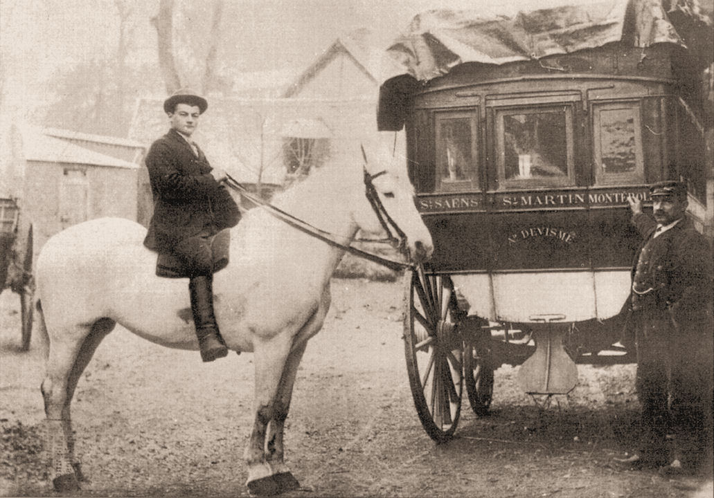 La patache de Saint-Saëns (jusqu'à Montérolier-Buchy)